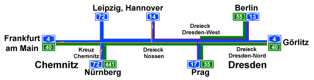 Das Schema verdeutlicht die Bedeutung der Bundesautobahn 4 zwischen Chemnitz und Dresden als Kreuzungspunkt des internationalen Fernverkehrs. Der rote Faden zeigt die Süd-Nord; der gelbe die Ost-West-Verbindungen